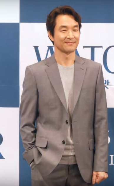 2일 오후 서울시 강남구 논현동 임피리얼팰리스 서울에서 OCN 새 토일드라마 '왓쳐(WATCHER)' 제작발표회가 열려 배우 한석규, 서강준, 김현주, 허성태, 박주희가 참석해 포토타임을 갖고 있다.